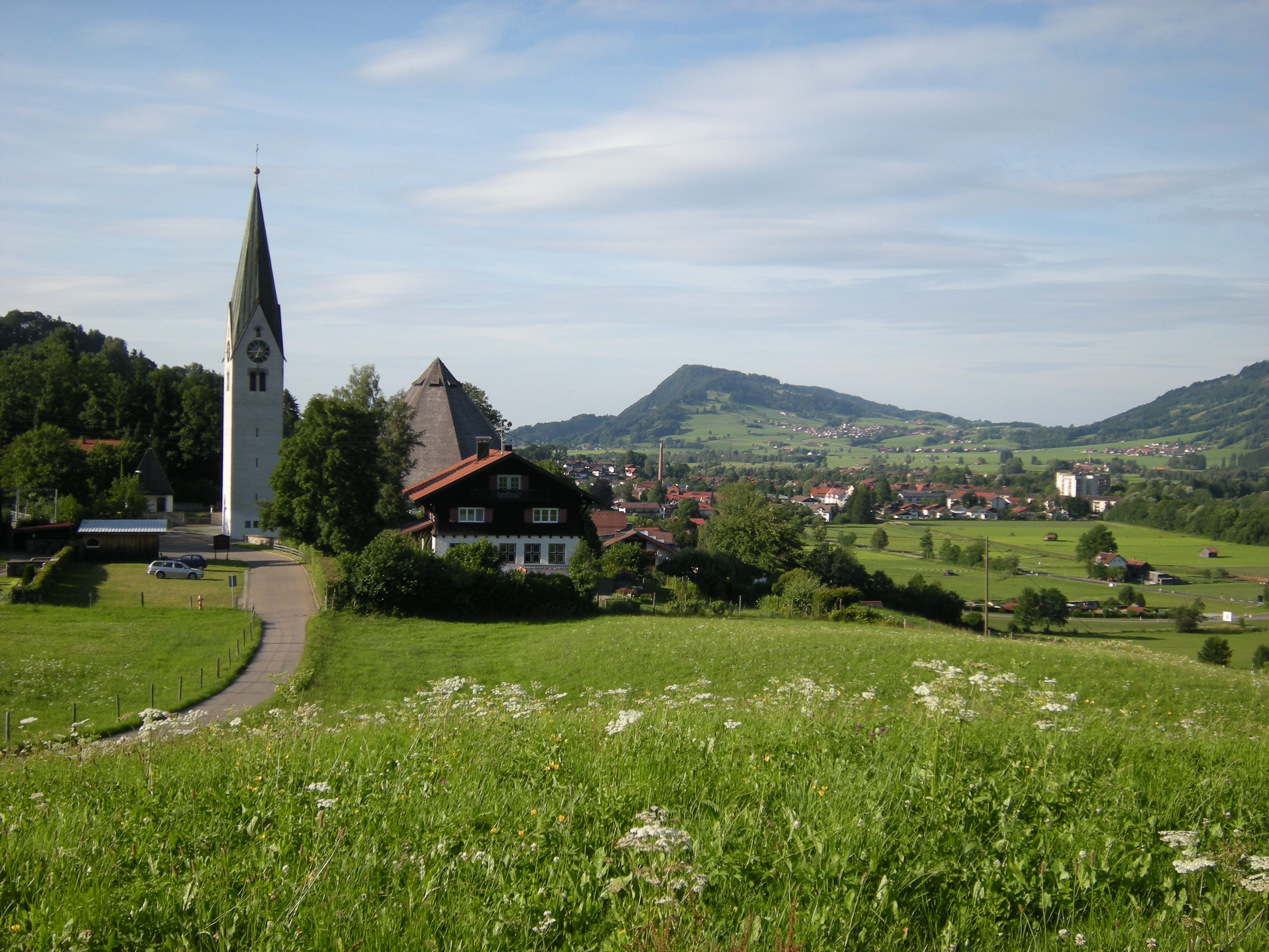 Seifriedsberg, im Hintergrund der Rottachberg